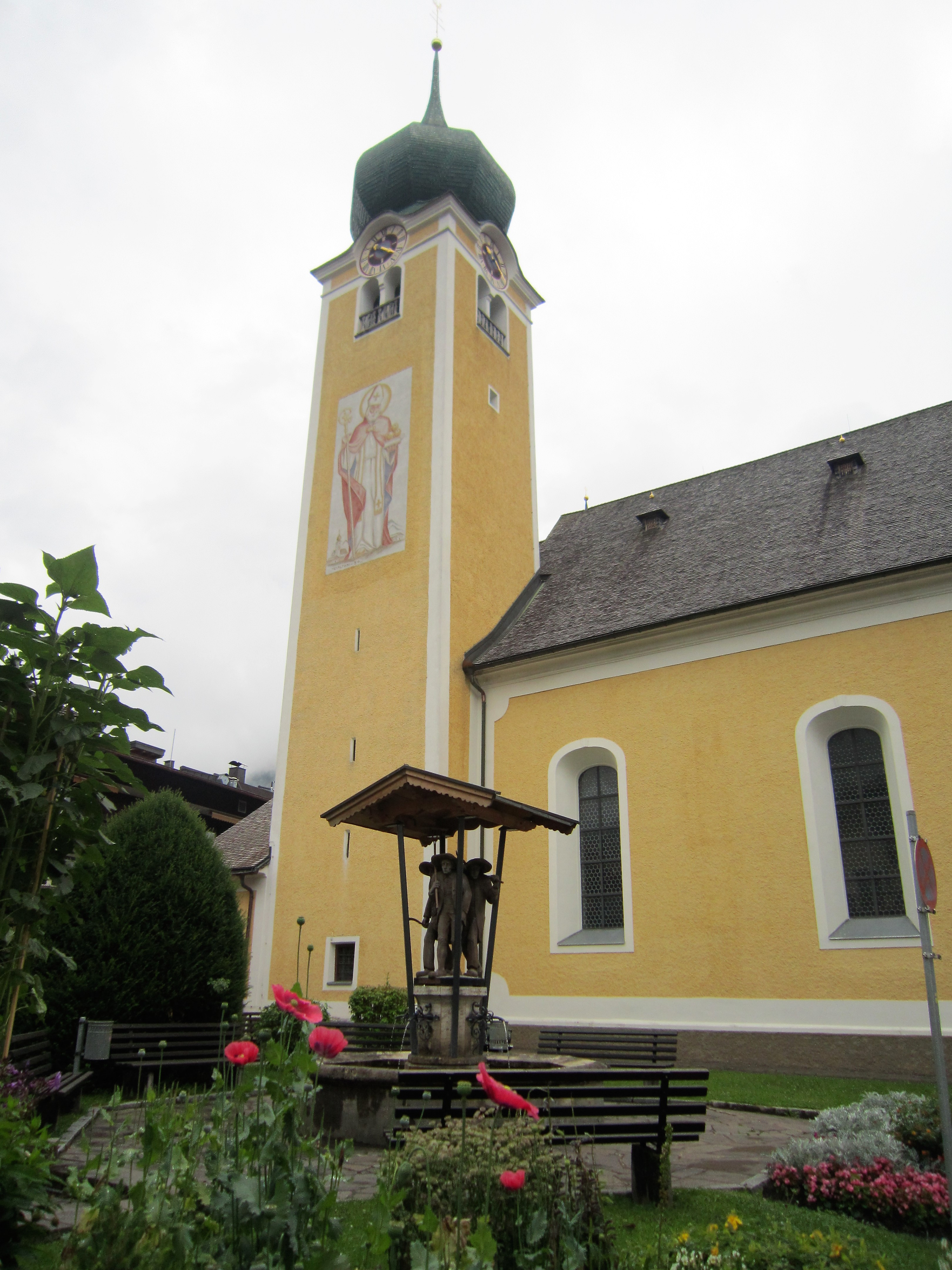 Pfarrkirche St. Nikolaus im "Blumendorf" Westendorf (Tirol) This media shows the remarkable cultural object in the Austrian state of Tyrol listed by the Tyrolean Art Cadastre with the ID 10687. (on tirisMaps, pdf, more images on Commons) This media shows the remarkable cultural object in the Austrian state of Tyrol listed by the Tyrolean Art Cadastre with the ID 10685. (on tirisMaps, pdf, more images on Commons)